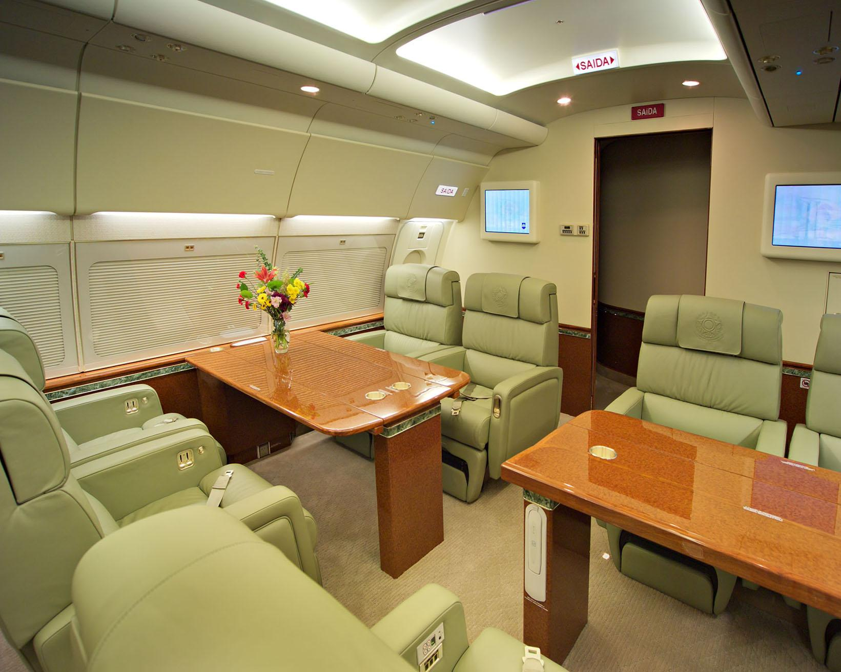 A Aeronave presidencial (FAB 001; Aerolula) brasileira.